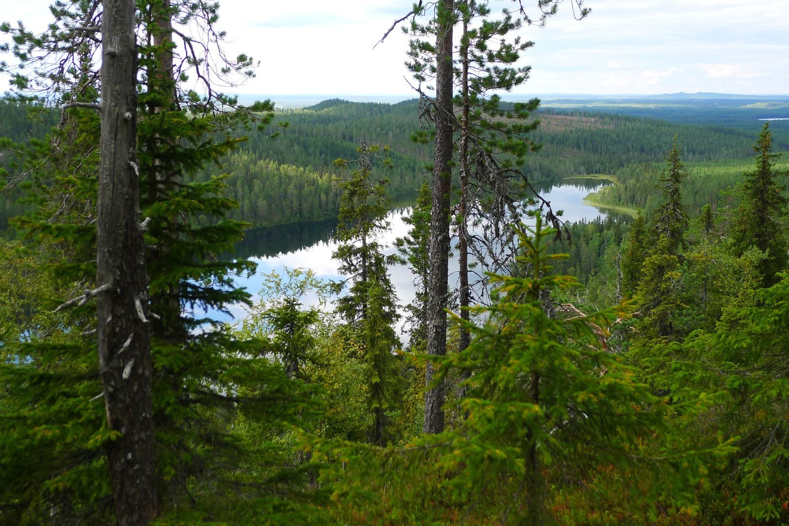 Valtavaara Nature Reserve, Ruka, Finland